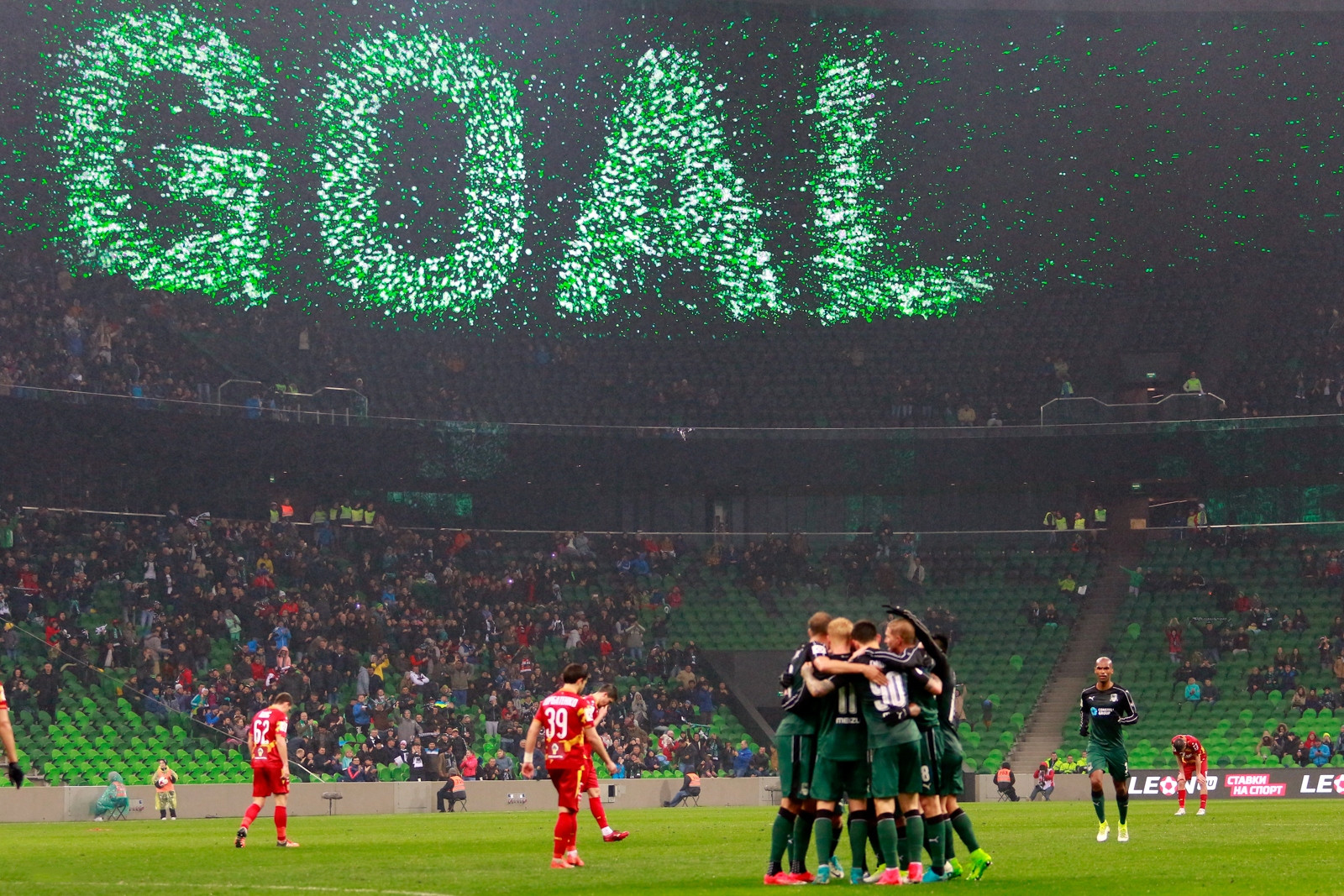 «Краснодар» - «Арсенал»